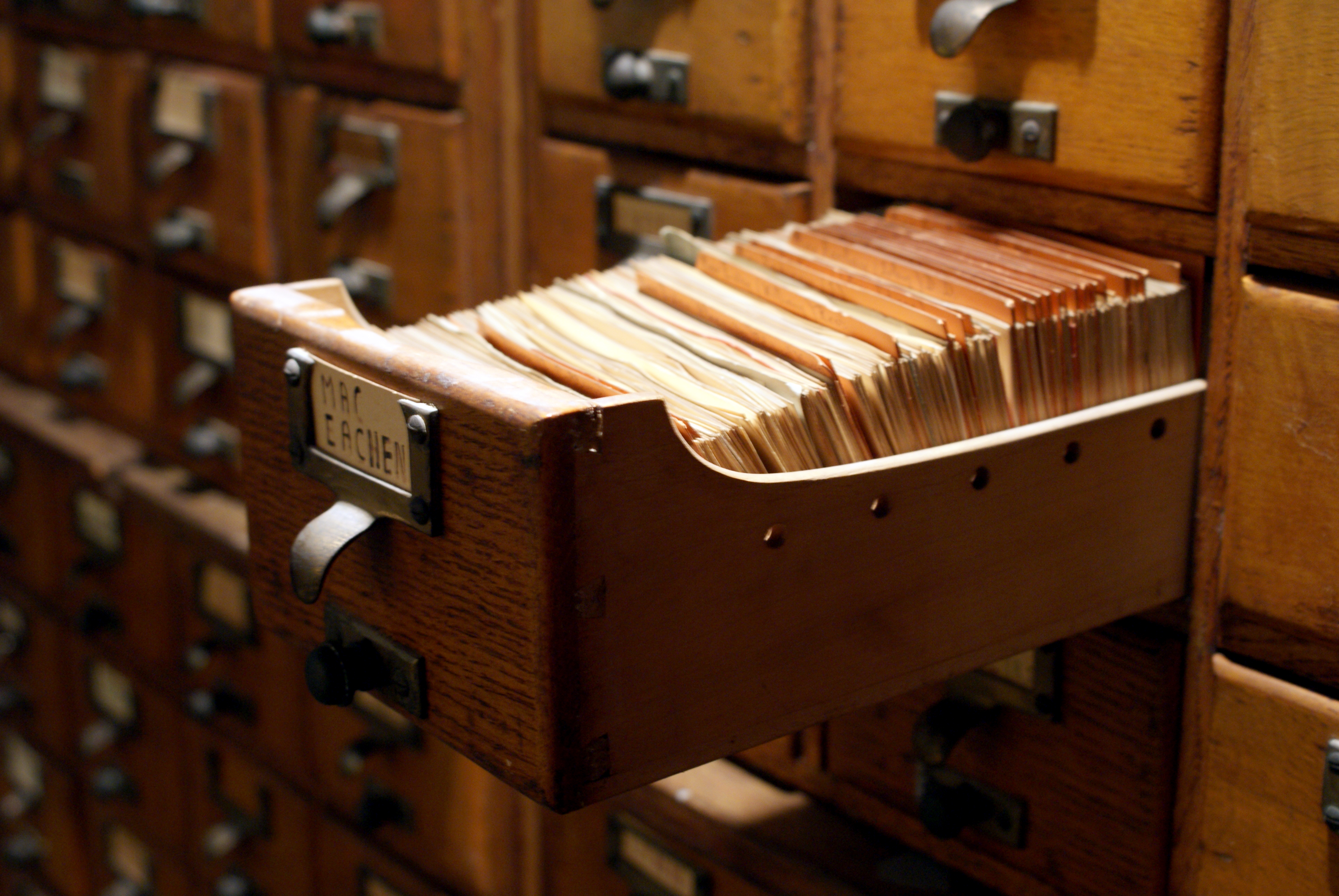 Kartotéční MDT řazení ve Světovém paláciFoto CC-BY 2.0: Marc Wathieu